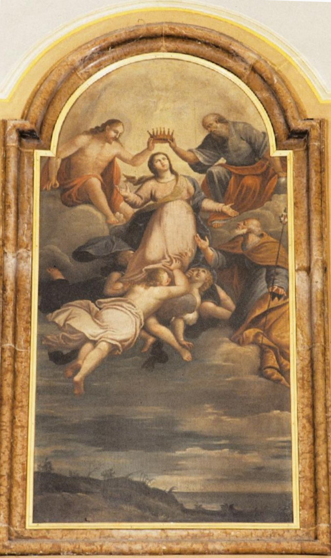 olio su tela di F.Trivellini del sec.XVIII. Pozzoleone (VI) chiesa Parrocchiale.